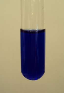 Tetramminekoper(II)sulfaat (complex van koper II+) (tetramminecopper(II) sulfate)